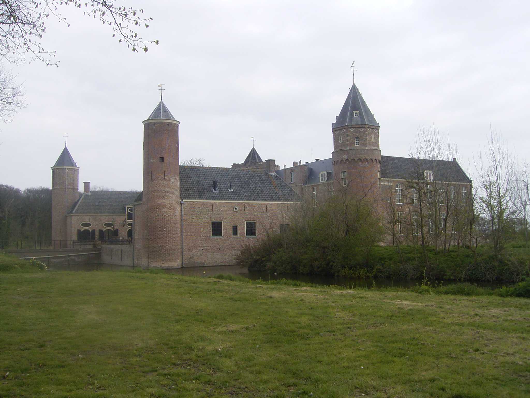 Deze foto toont kasteel Westhove bij Oostkapelle. Deze foto maakte ik gisteren tijdens een wandeling.